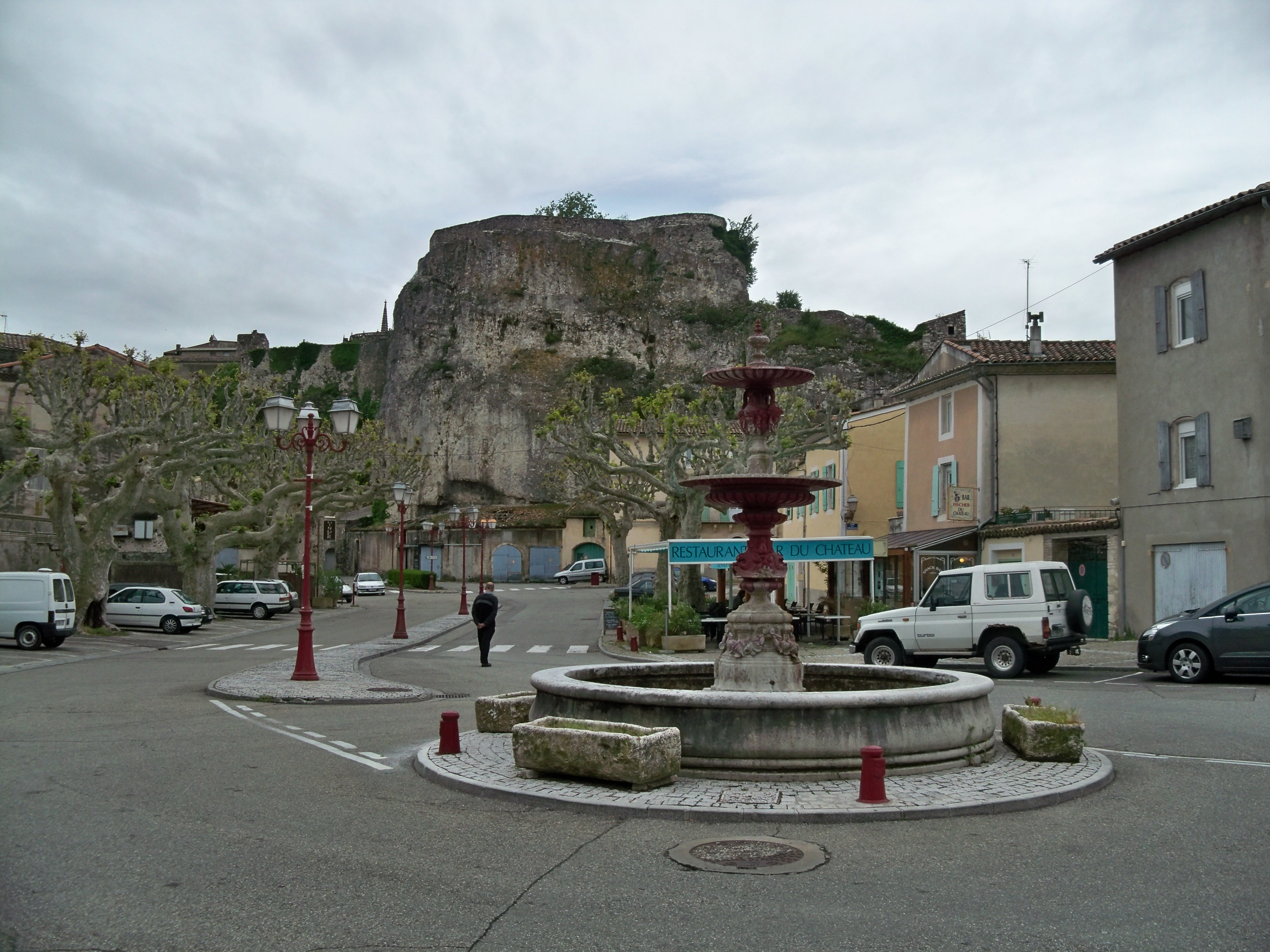 fontaine à Viviers